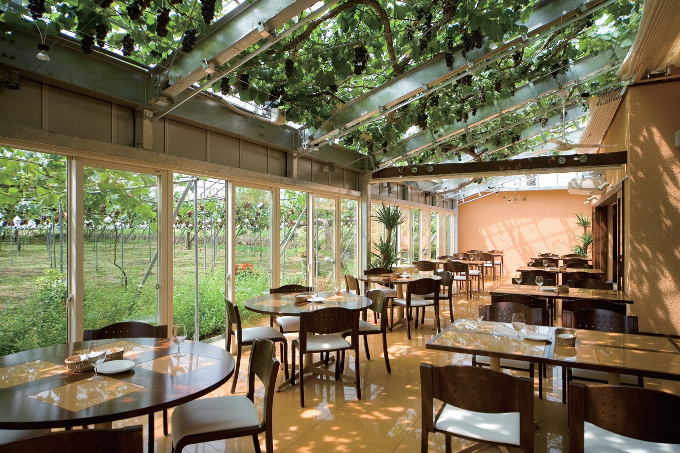 イタリアンカフェぶどうの木